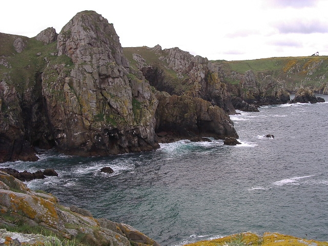 Réserve du cap Sizun, Finistère, France